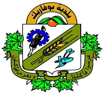 الشعار الخاص بمدينة بوفاريك